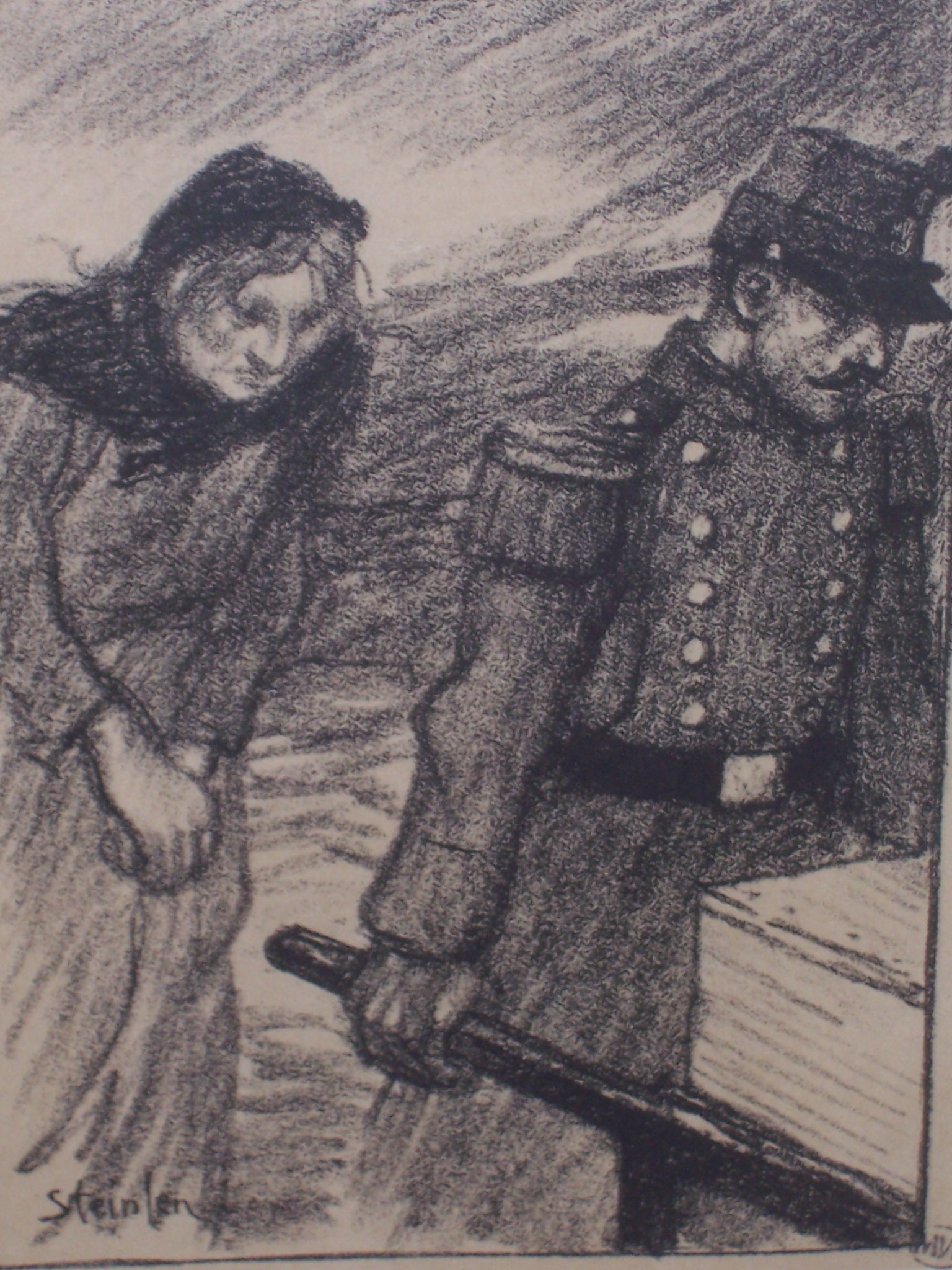 Enterrement de mineur - tableau de Steinlen, musée d'Anzin